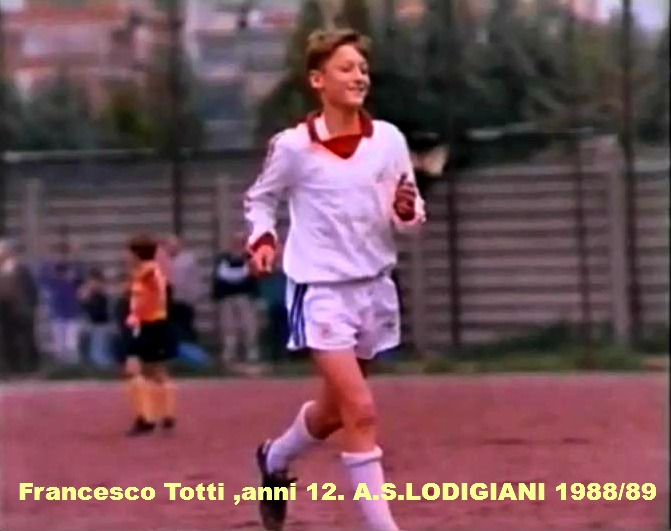 1989,l'anno dell'inizio Giallorosso.(Lodigiani-Roma campionato Giovanissimi.Campo "Francesca Gianni" Roma) In questa foto ,proveniente dalla'archivio della Lodigianicalcio,l'ultima stagione di Francesco con la società bianco-rossa-blù. Totti è ritratto mentre torna,felice,a centrocampo dopo aver segnato un gol proprio alla sua prossima società.Quasi un segno del destino.Tra pochi mesi la sua maglia cambierà definitivamente colore ed im modo definitivo. Giallorosso per sempre.